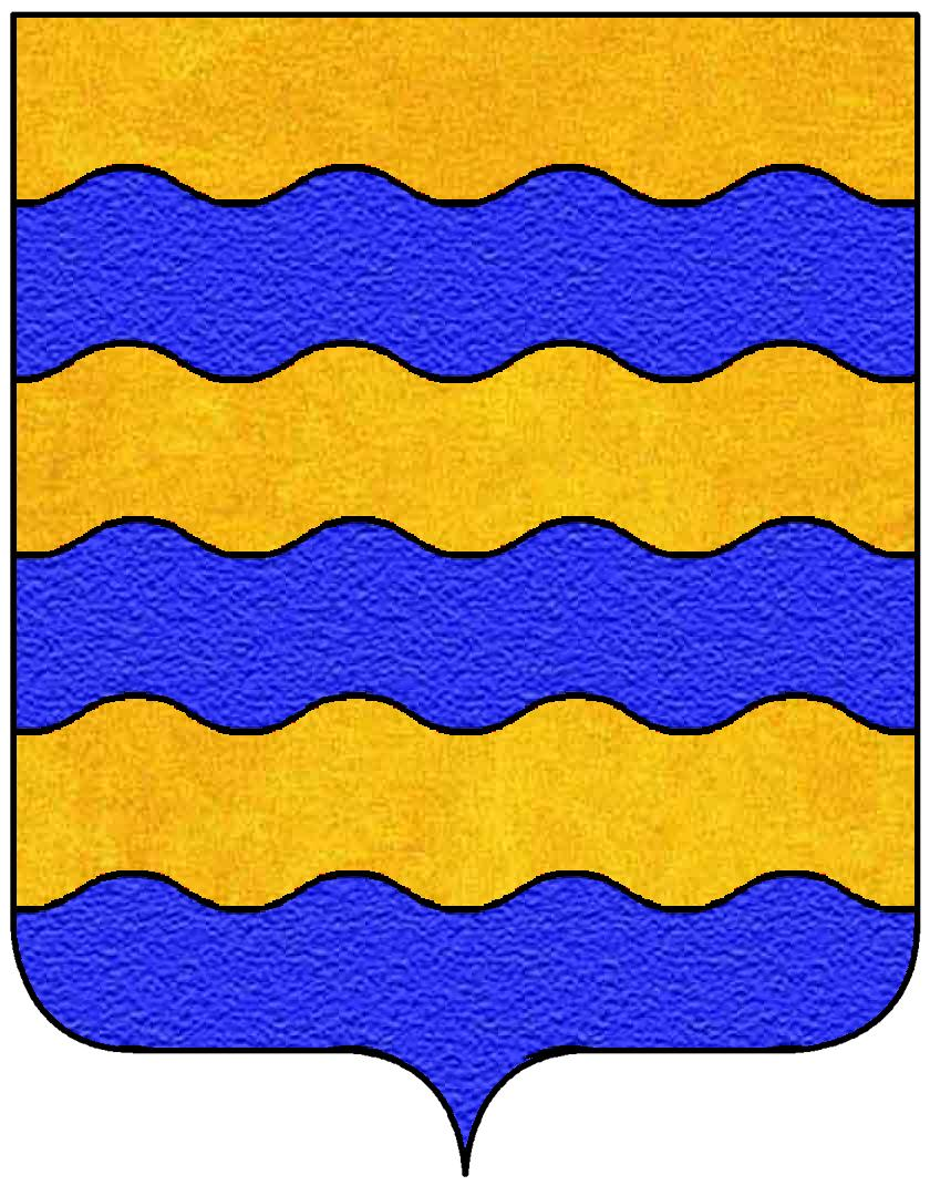 Stemma della famiglia Casali